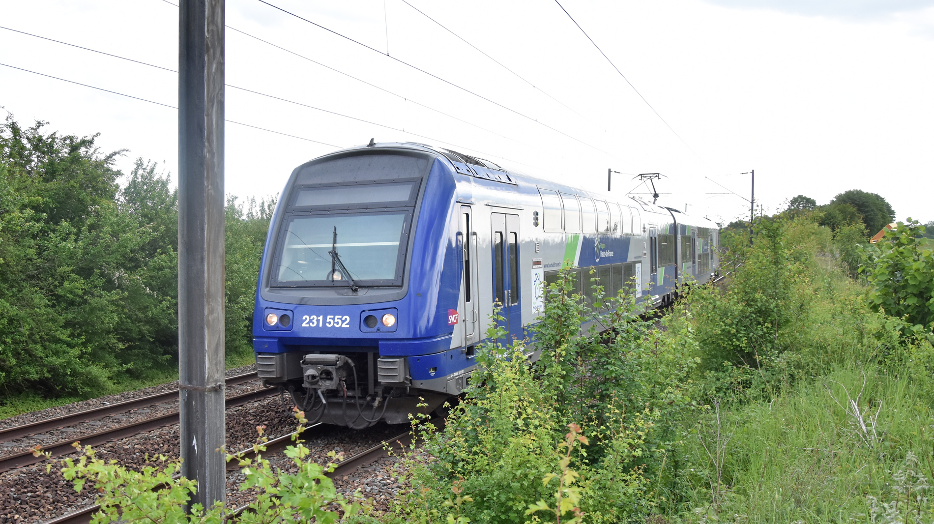 Z 23552 à Vecquemont